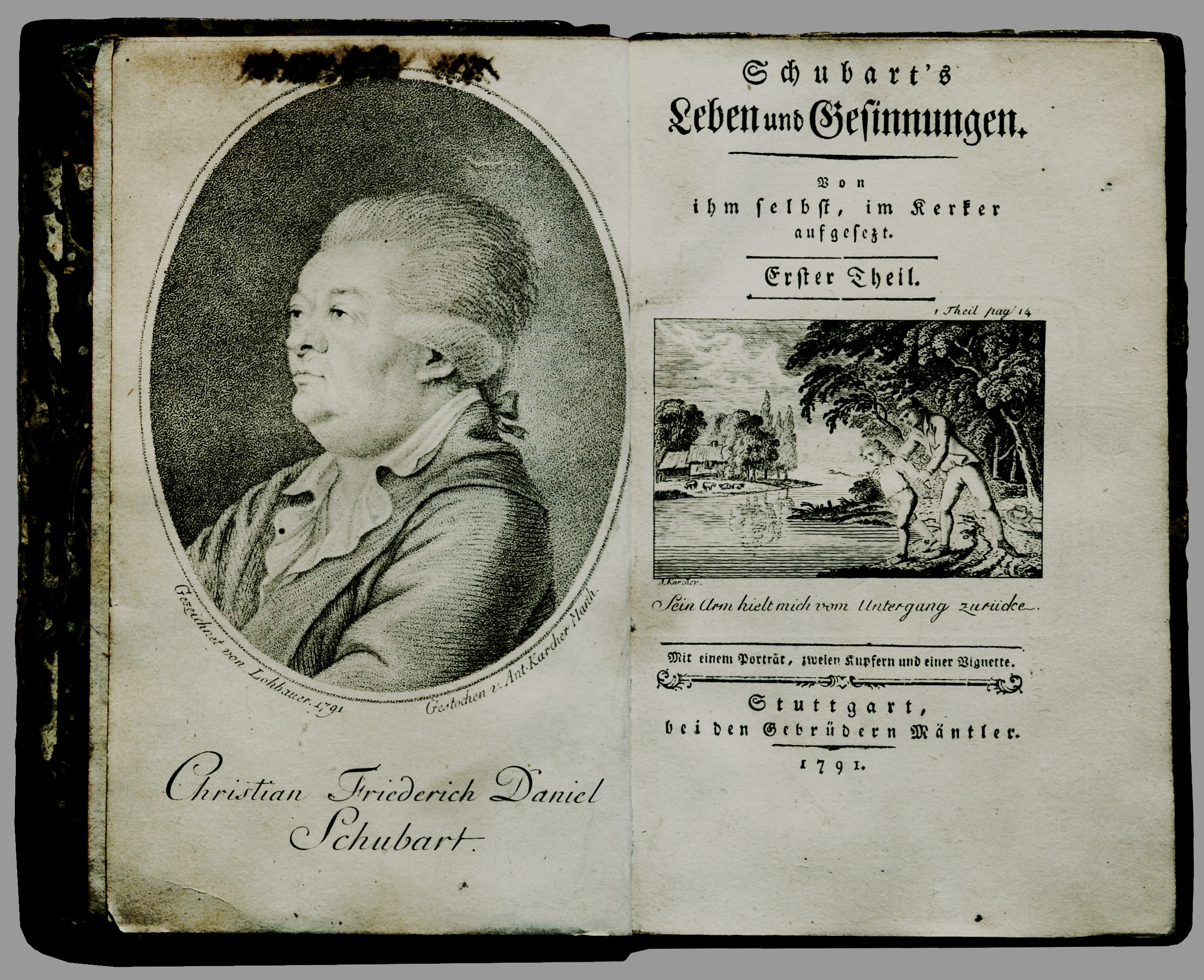 Christian Friedrich Daniel Schubarts "Leben und Gesinnungen" 1791